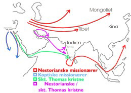 Kristendommens tidlige spredning i Asien. Tidlige kristne missionærer i Afrika og Asien